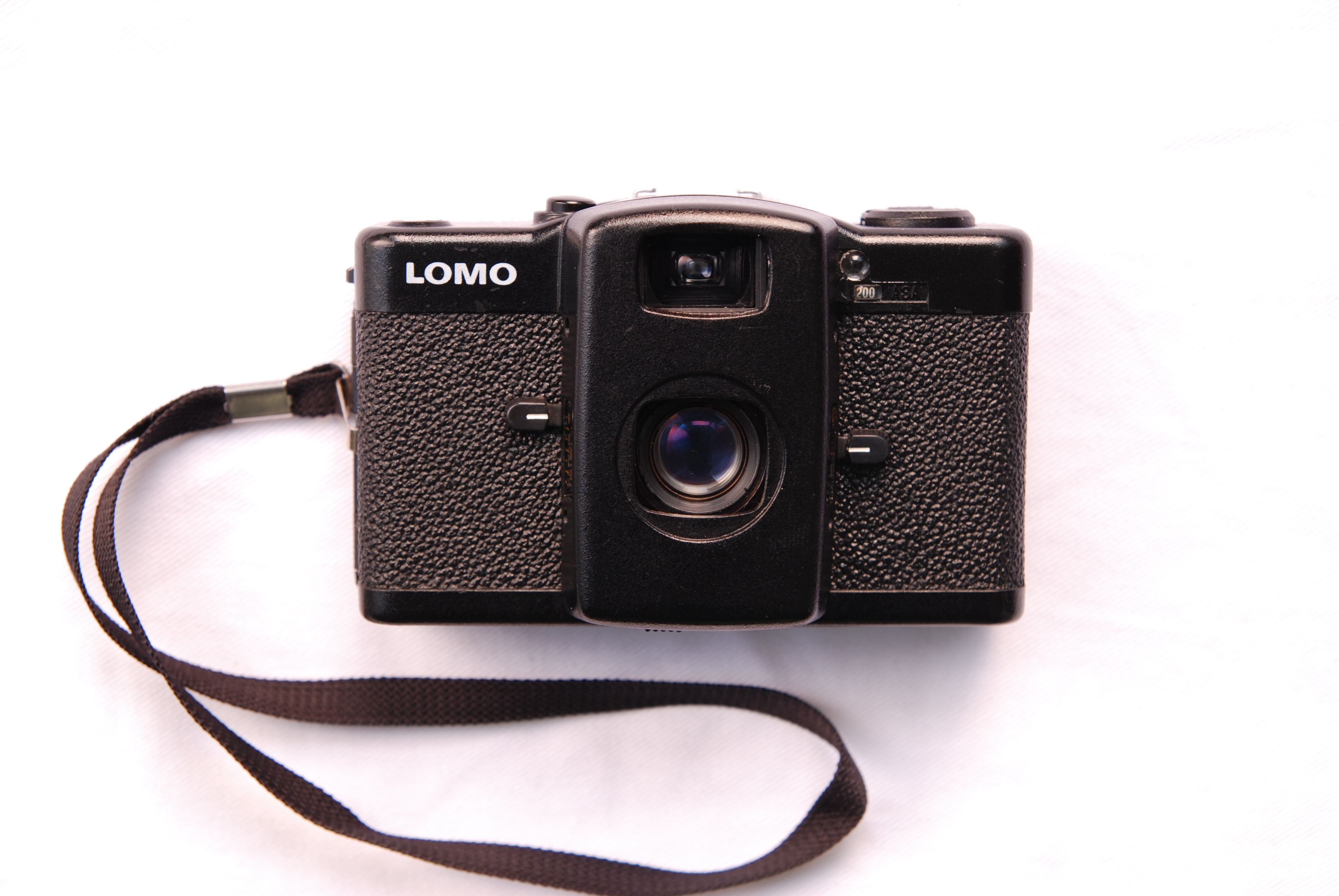 A Soviet-era LOMO LC-A compact camera.